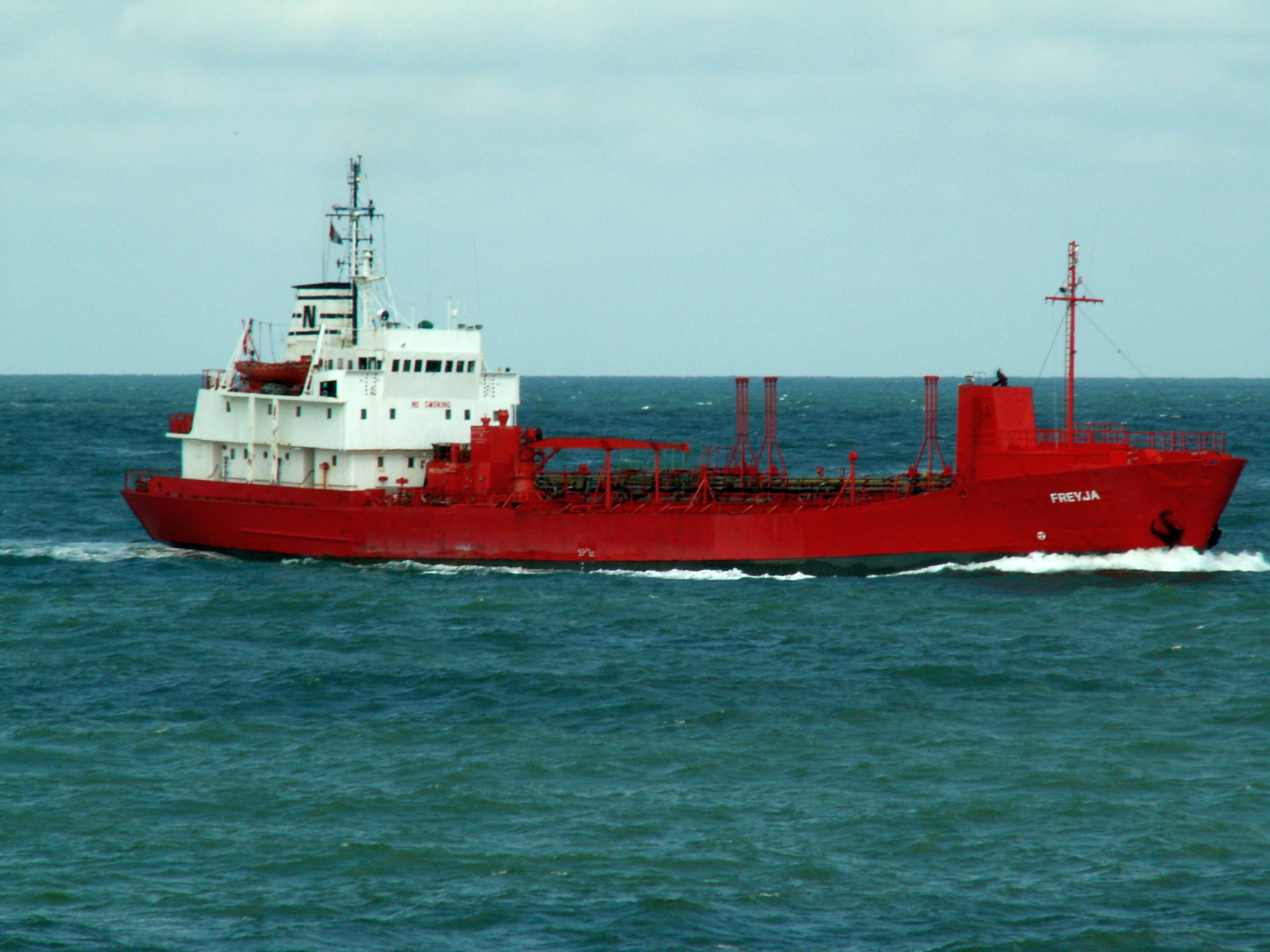 Freyja IMO 7392610